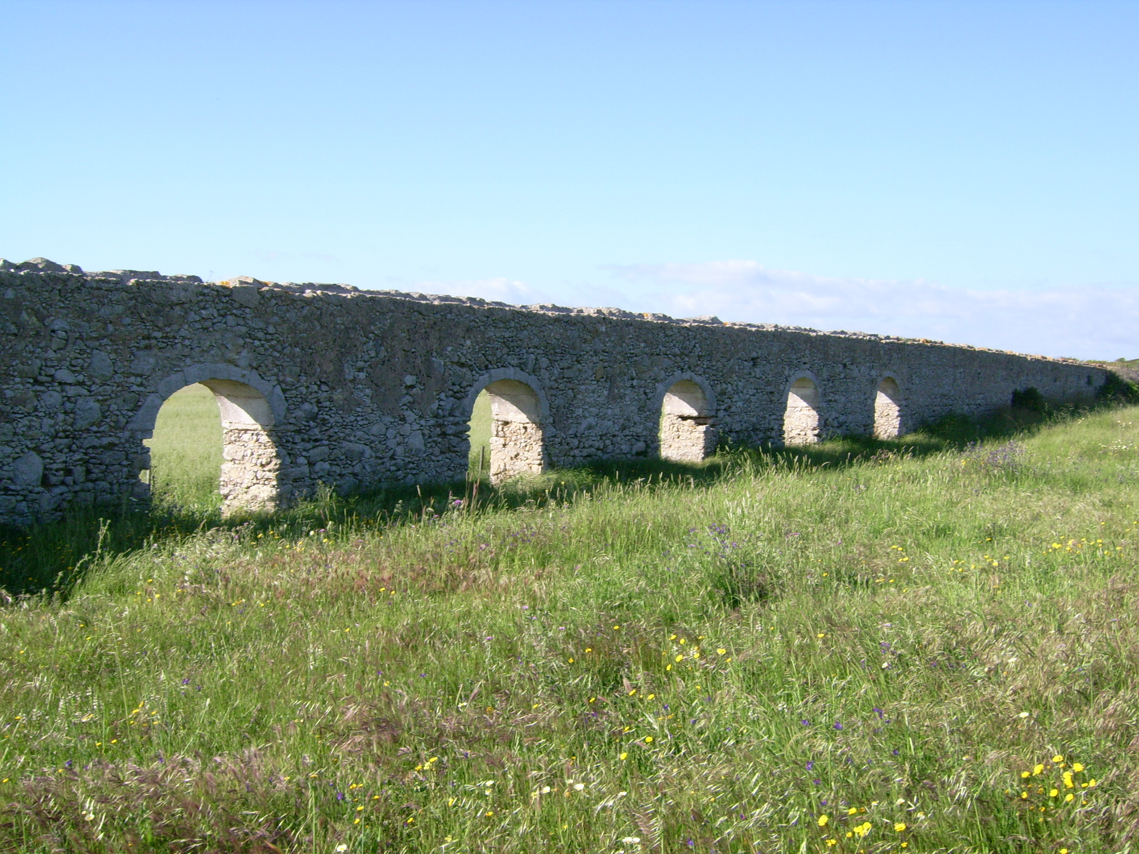 Aqueduto: Local - Cabo Espichel / Sesimbra / Portugal user:sacavem (pt) (usuário:sacavem)